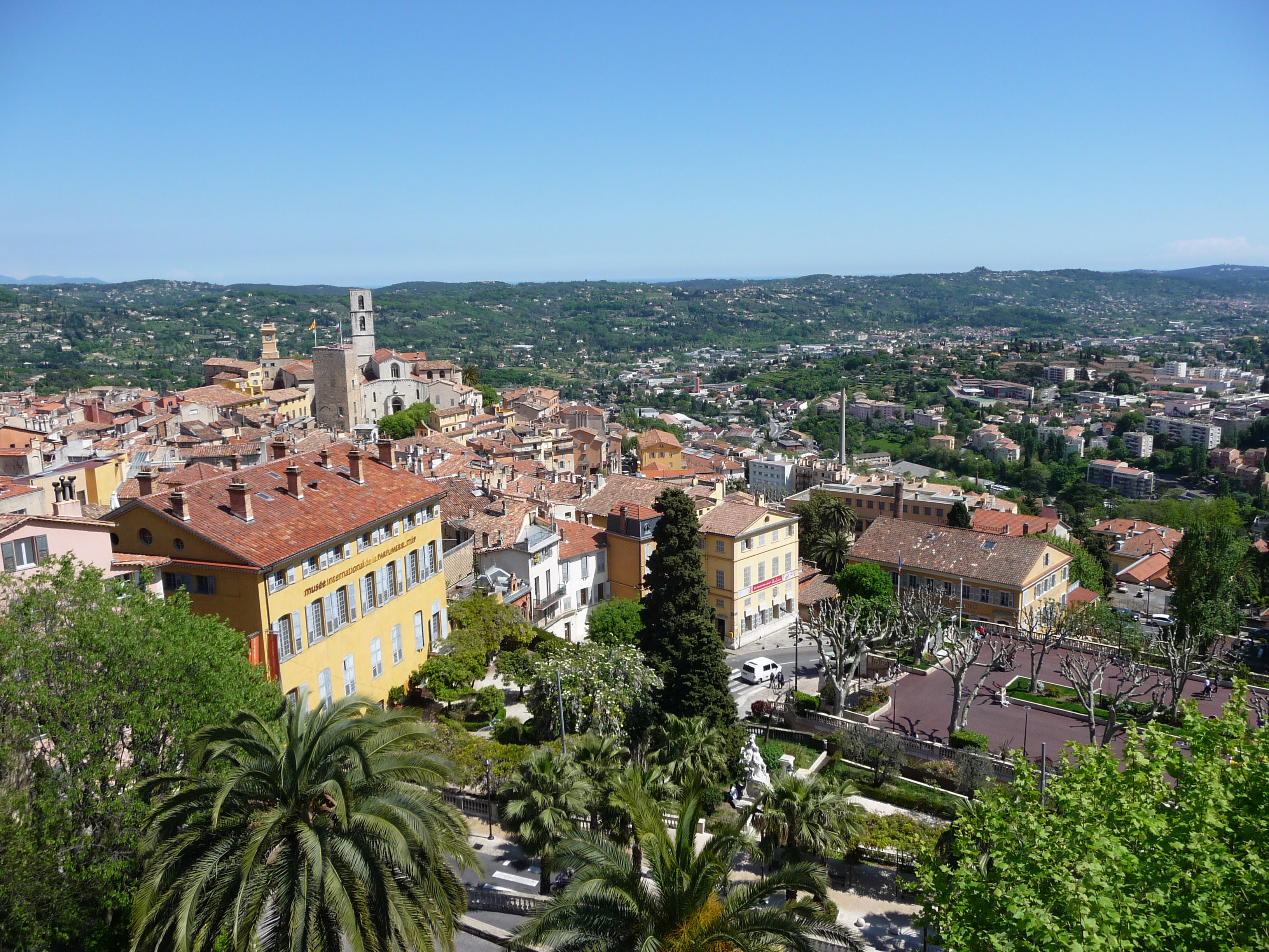 Vieux Grasse